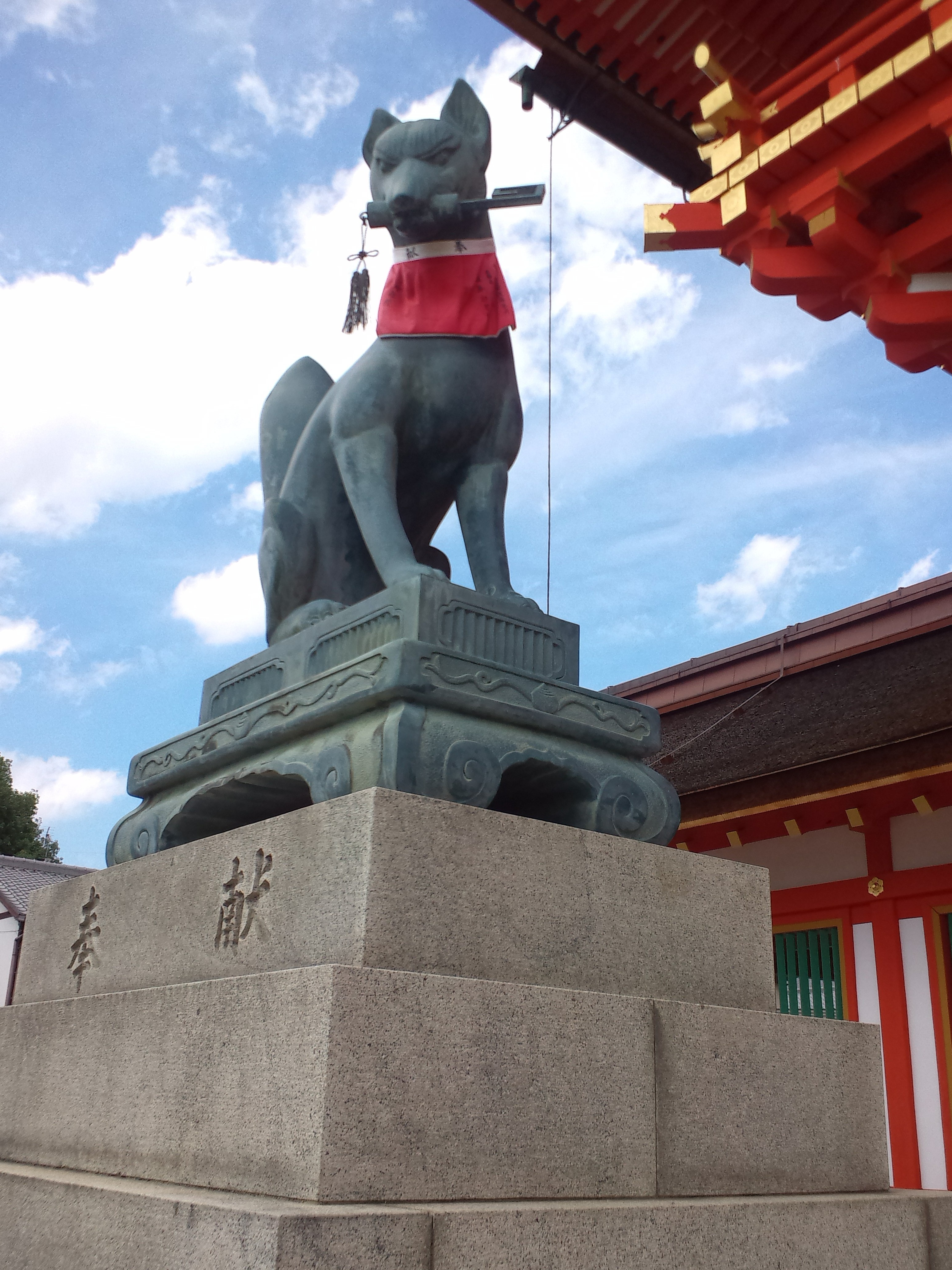 伏見稲荷大社 楼門の狐像